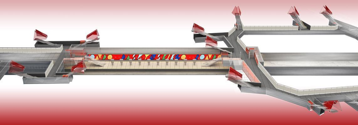 Wielobranżowy Projekt Koncepcyjny centralnego odcinka II lini metra w Warszawie